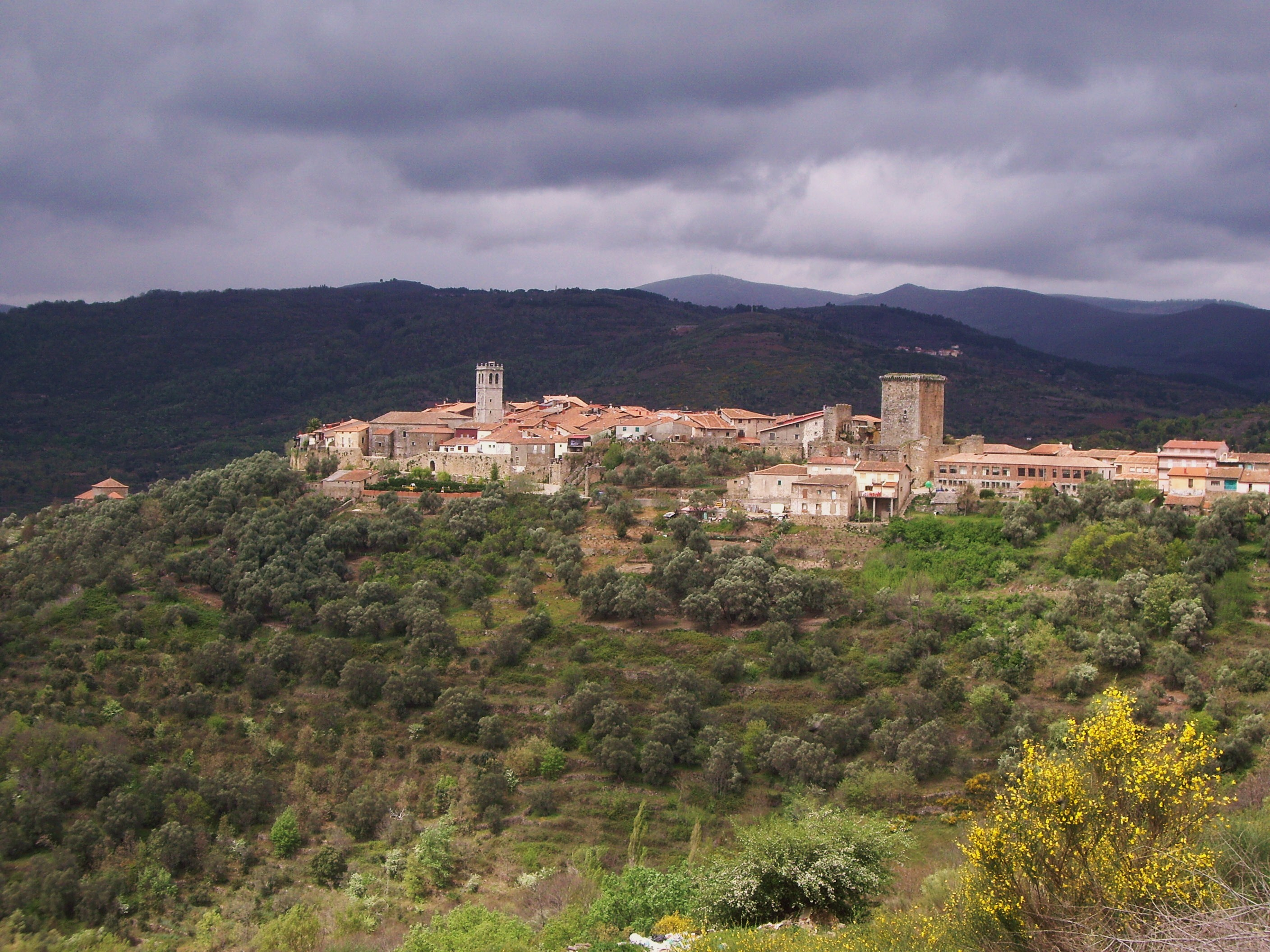 Vista General desde el monte de La veleta de Miranda del Castañar (Salamanca, Región Leonesa, España).